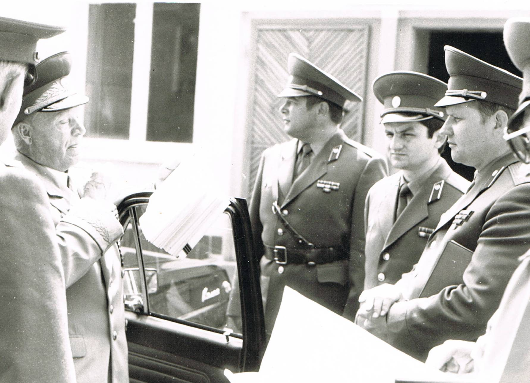 Командарм 4 гв. ТА Лелюшенко Д.Д. Степанов, Хронусов полковник Дорофеев А.А. в 81-м гв.мсп. Эберсвальде 1983.